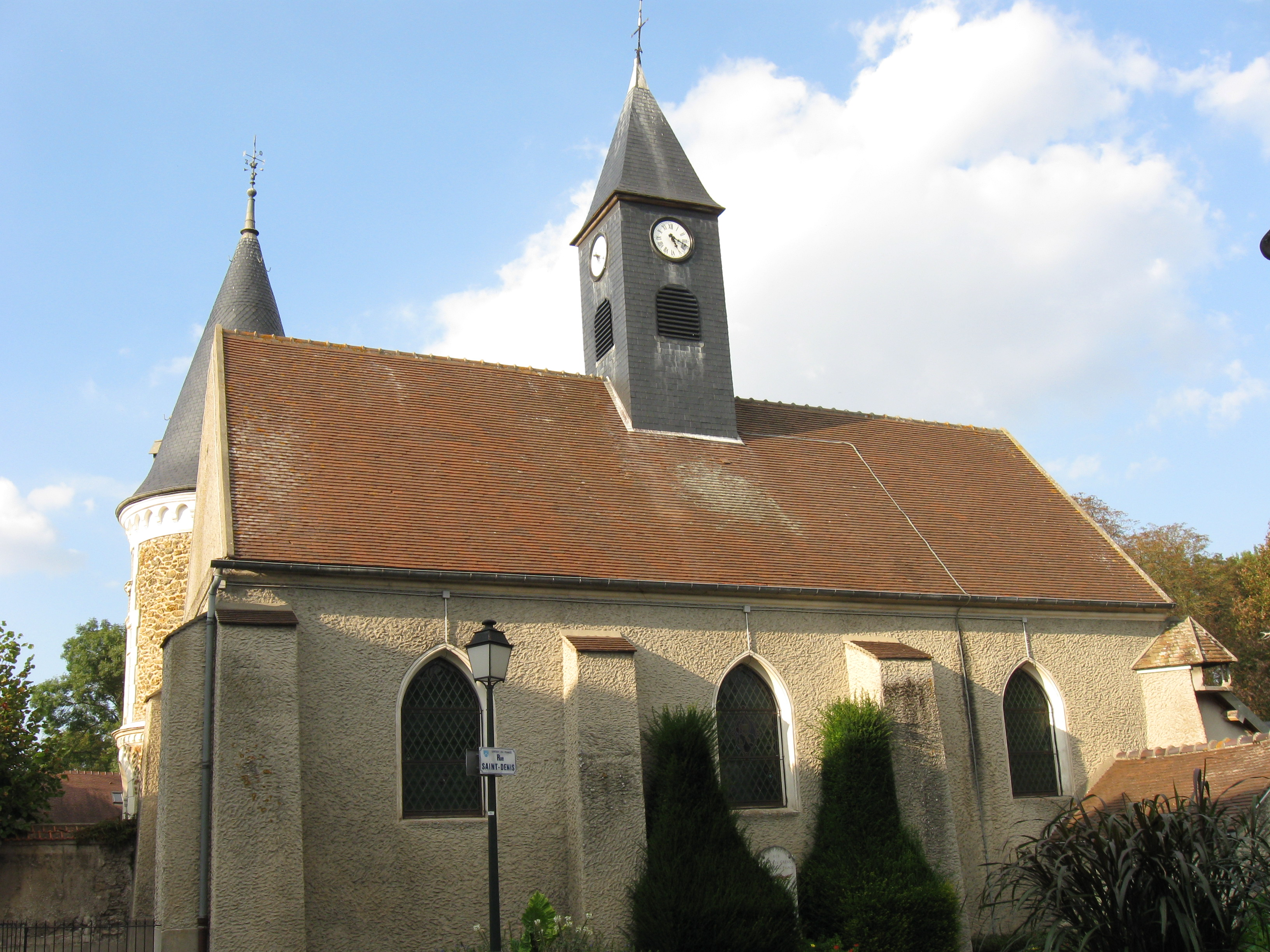 Église Saint-Denis de Gressy. (Seine-et-Marne, région Île-de-France).